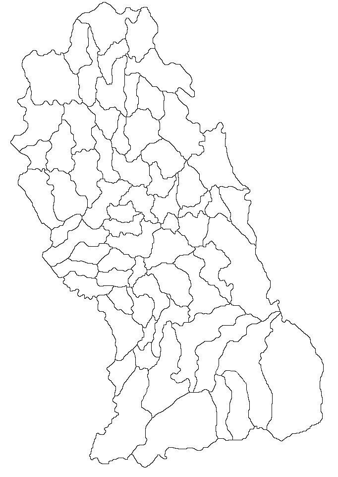 Categorie:Hărţi ale judeţului Hunedoara